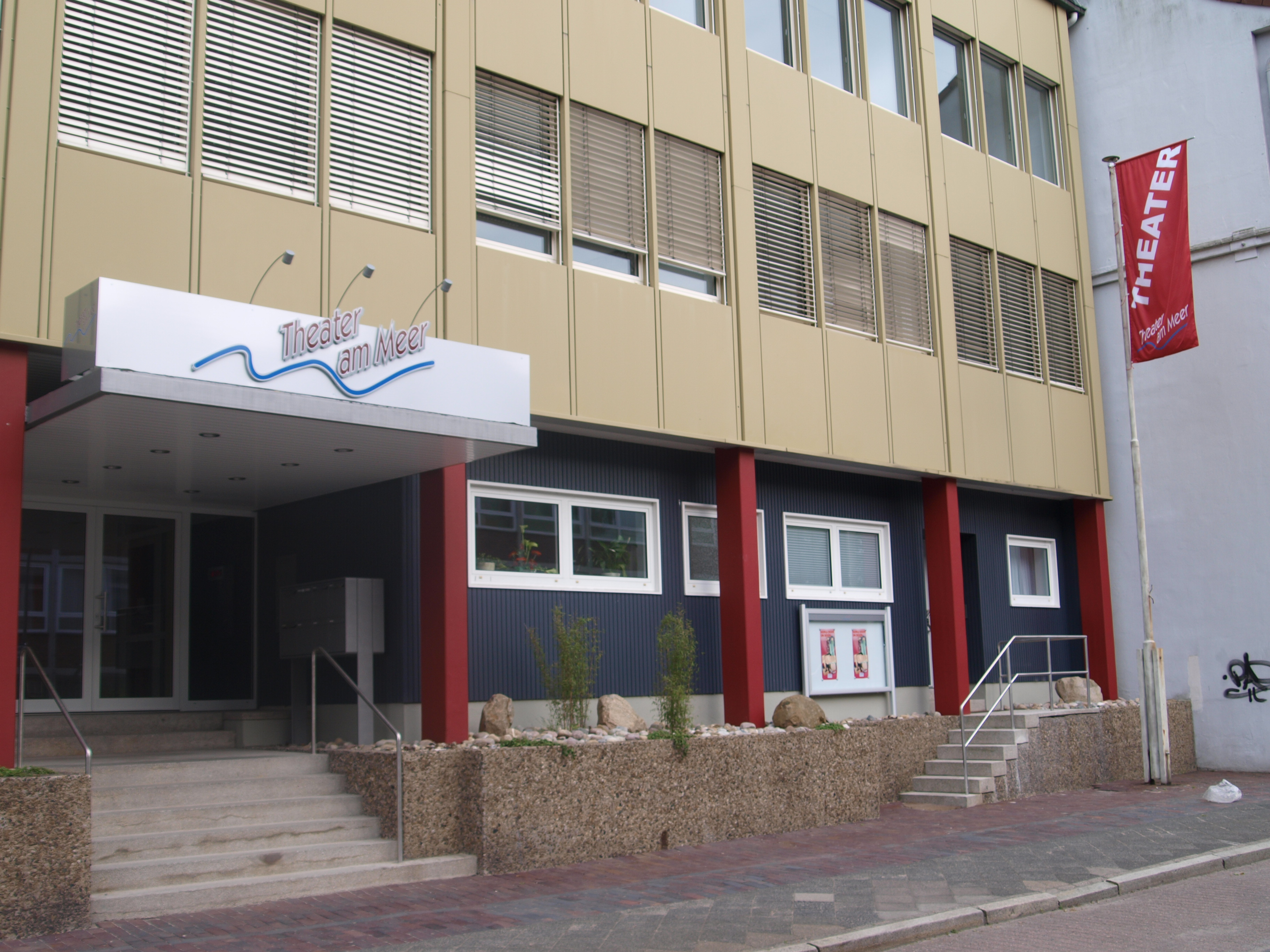 Theater am Meer - Niederdeutsche Bühne Wilhelmshaven; Eingang mit Logo und Theaterfahne